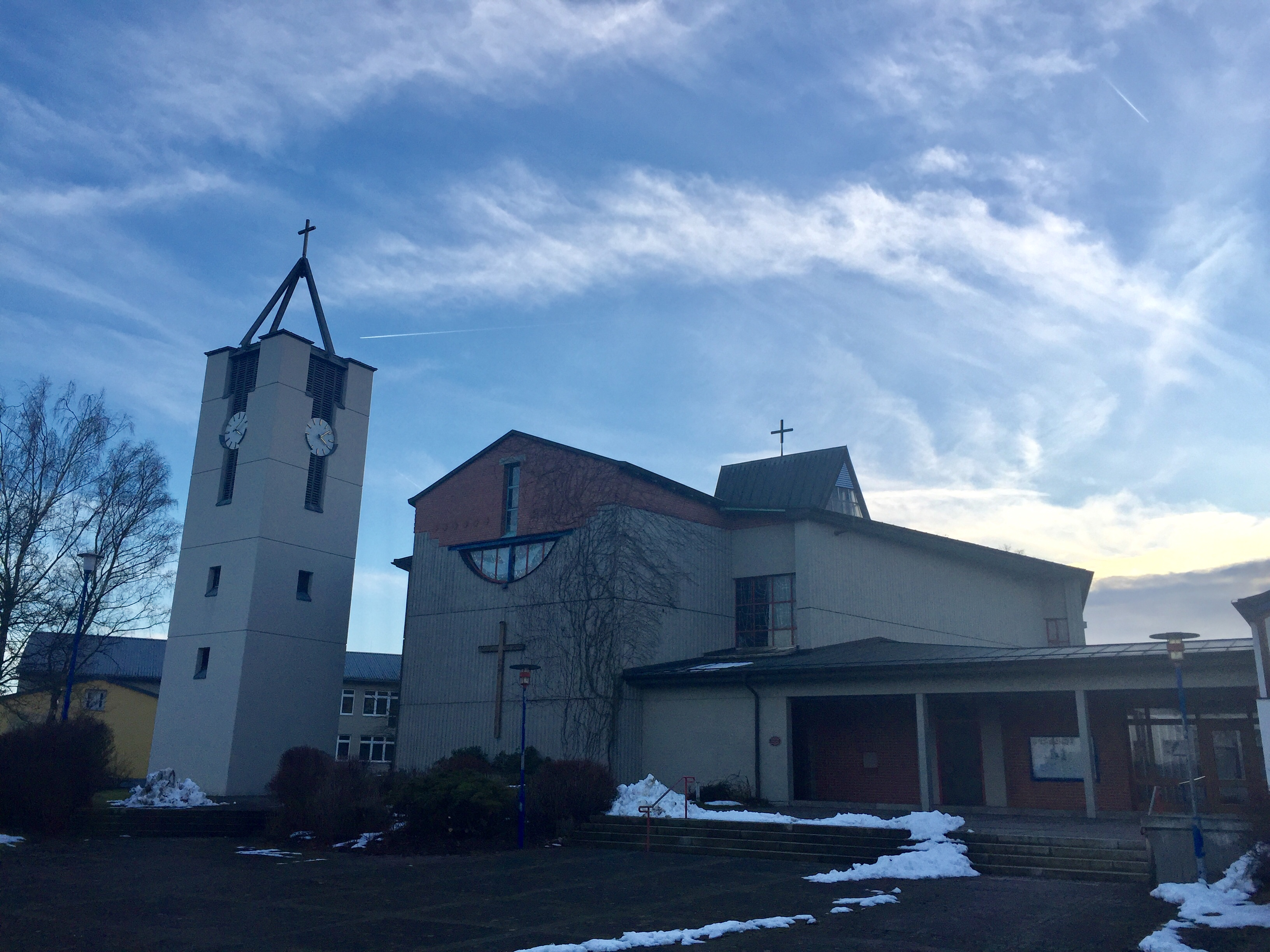 Heilig-Geist-Kirche Neuhaus